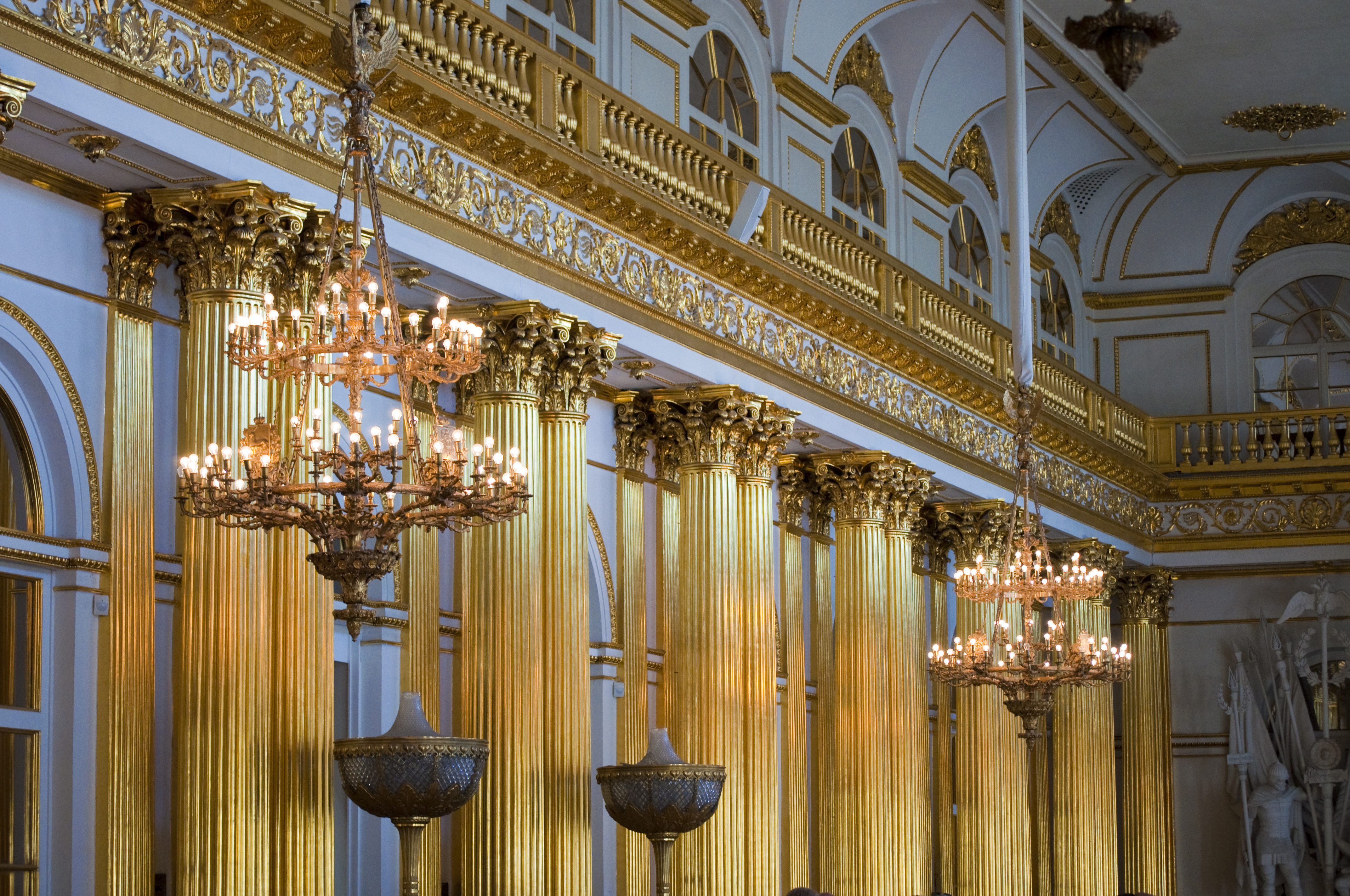 hermitage museum